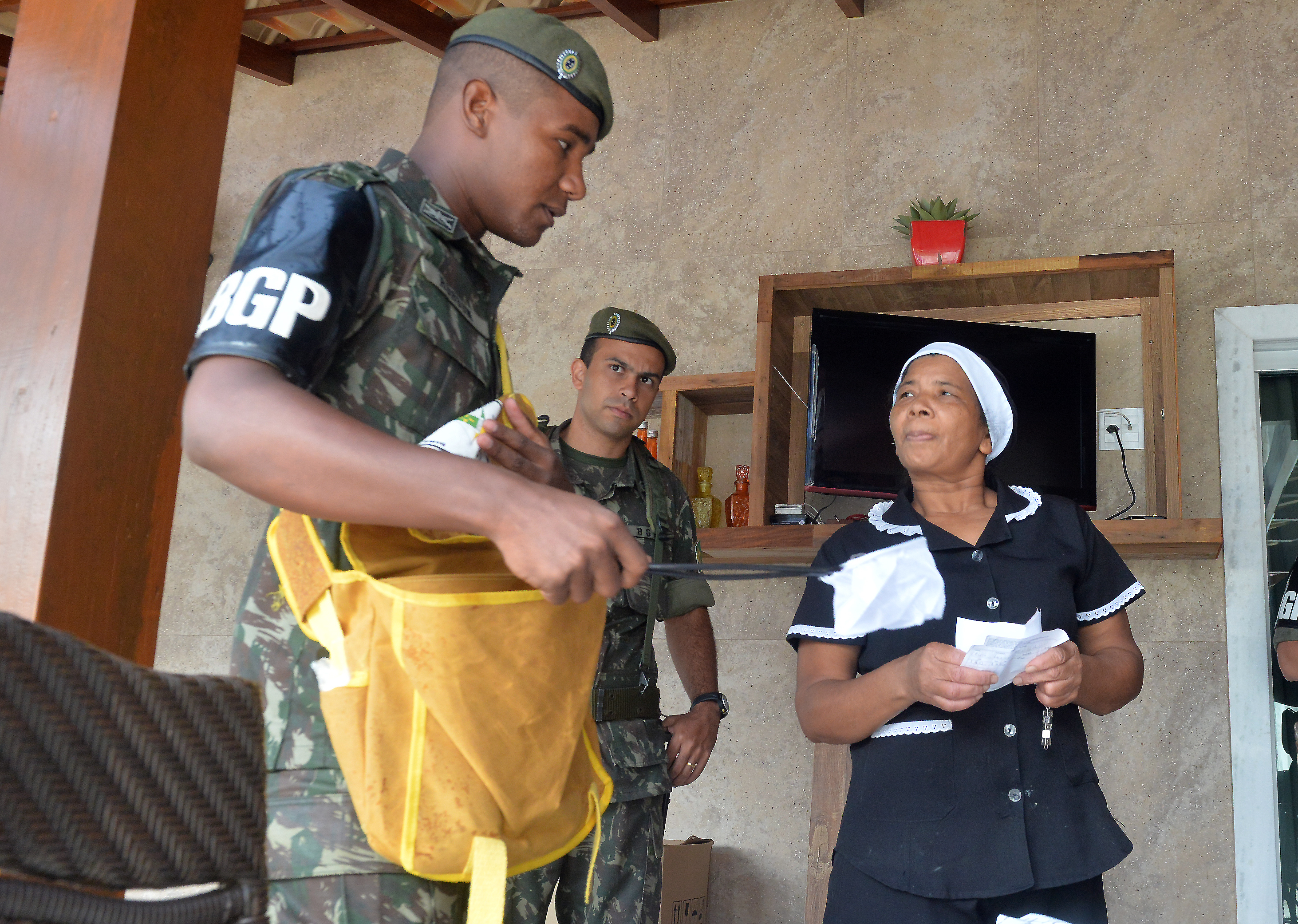 15/01/2016, Brasília - DF Fotos: Tereza Sobreira